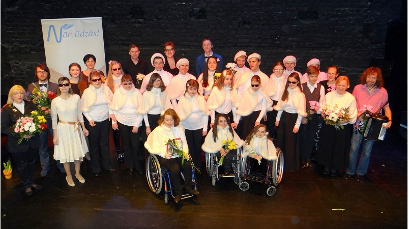 Nāc līdzās! koris audiodiska "Nāc līdzās un dziedi Eiropā" prezentācijas koncertā.